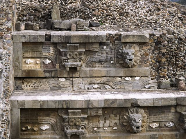 Templo de Quetzalcóatl em Teotihuacán, México; Fotografia tirada em Fevereiro de 2004.